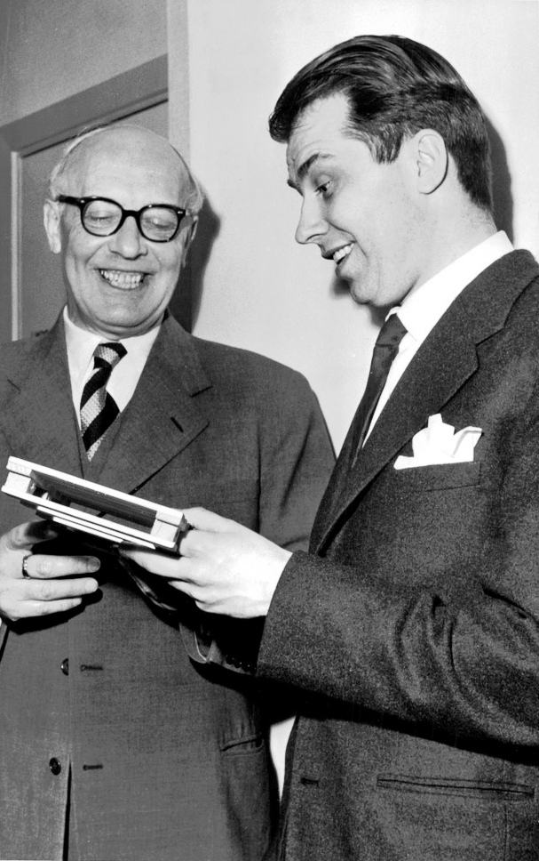 Doktor Hilding Törnebohm och direktör Olle Sturén med en modell av en standardiserad lastpall.En av de största kongresserna i Stockholms historia öppnas den 6 juni. Då sammanträder nämligen den Internationella standardiseringskommissionen, ISO, under beskydd av prins Bertil. 35 länder är anmälda till kongressen, och det beräknas att 800 personer deltar.